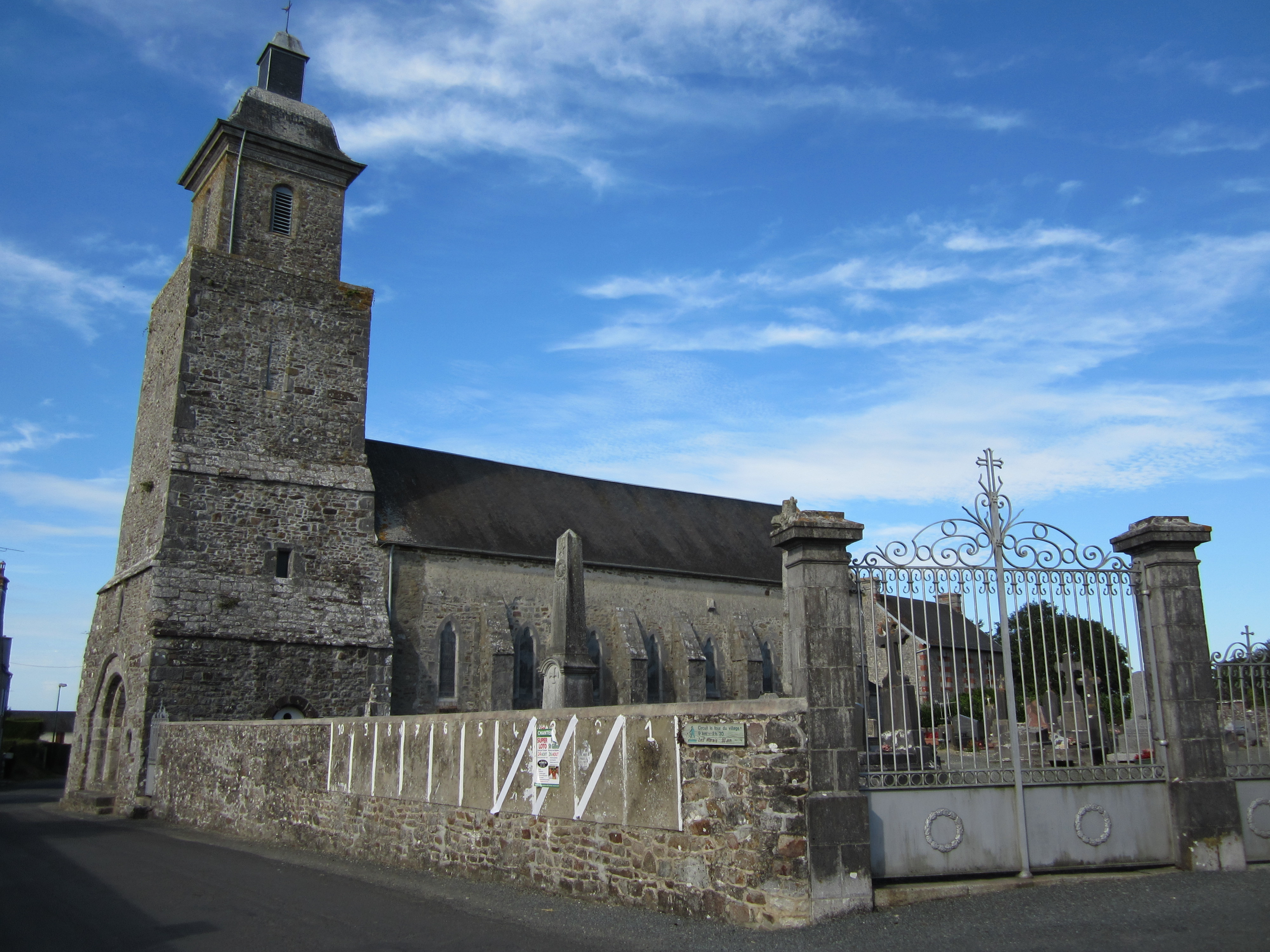 église Saint-Gratien d'Hérenguerville